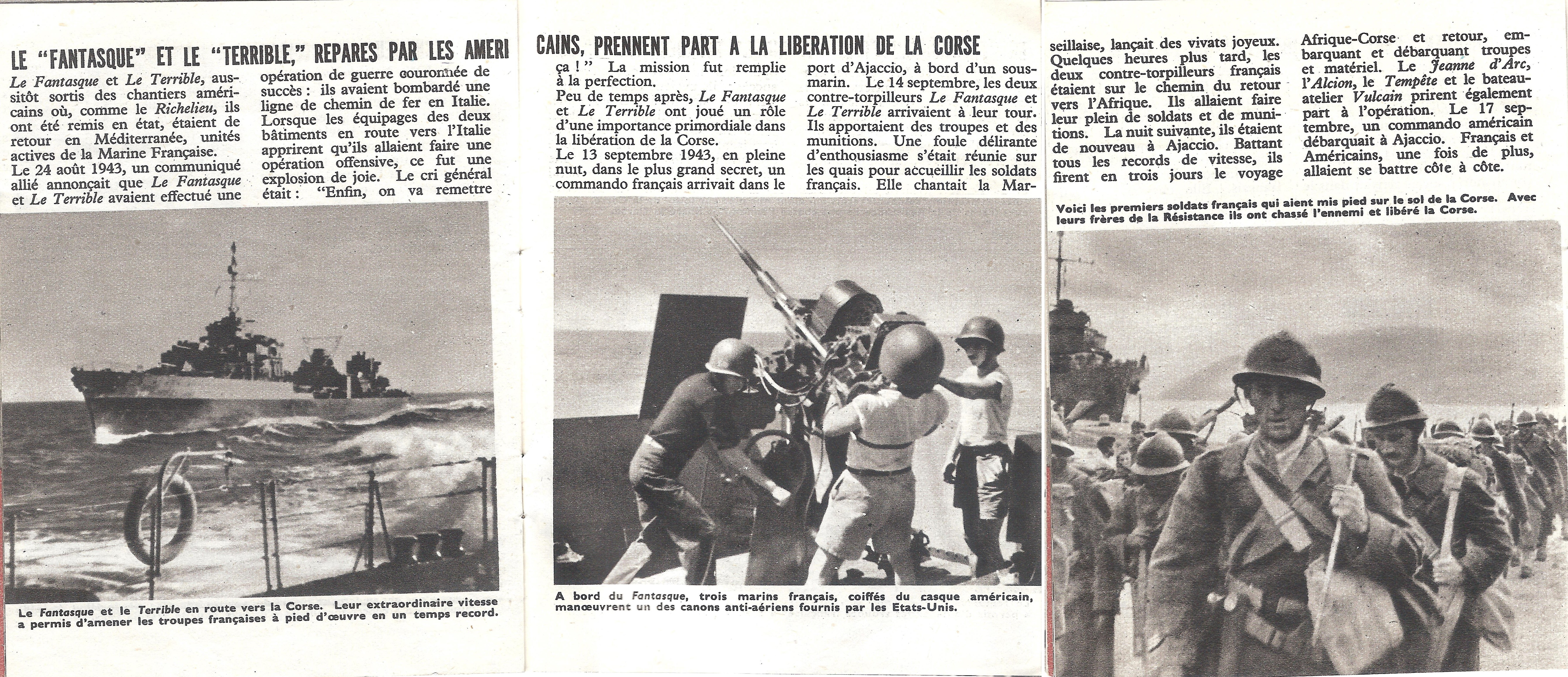 Cette illustration est extraite d’un fascicule de 30 pages, mesurant 102×132 mm (en fait, 4 pouces par 5 pouces et 3/16), intitulé « Réarmés ». On peut le dater grâce à une déclaration attribuée au président Roosevelt au dos de la dernière page, datée 2 janvier 1944, qui dit : « J’envisage le jour, par bonheur proche aujourd’hui, où les Français à l’intérieur et à l’extérieur de la France se joindront à leur alliés américains et britanniques pour chasser l’oppresseur du sol français. » Une note précise que ce fascicule fut « Publié par l’office d’information de Guerre des Etats-Unis d’Amérique U S F 91 » (Office of War Information). Il fut probablement jeté sur la France occupée par un avion américain pendant la campagne de bombardement de la première moitié de 1944, sans doute dans la région de Rennes où son propriétaire le ramassa, et dans les archives duquel il fut retrouvé en 2019. Archives Jean Grosdidier de Matons